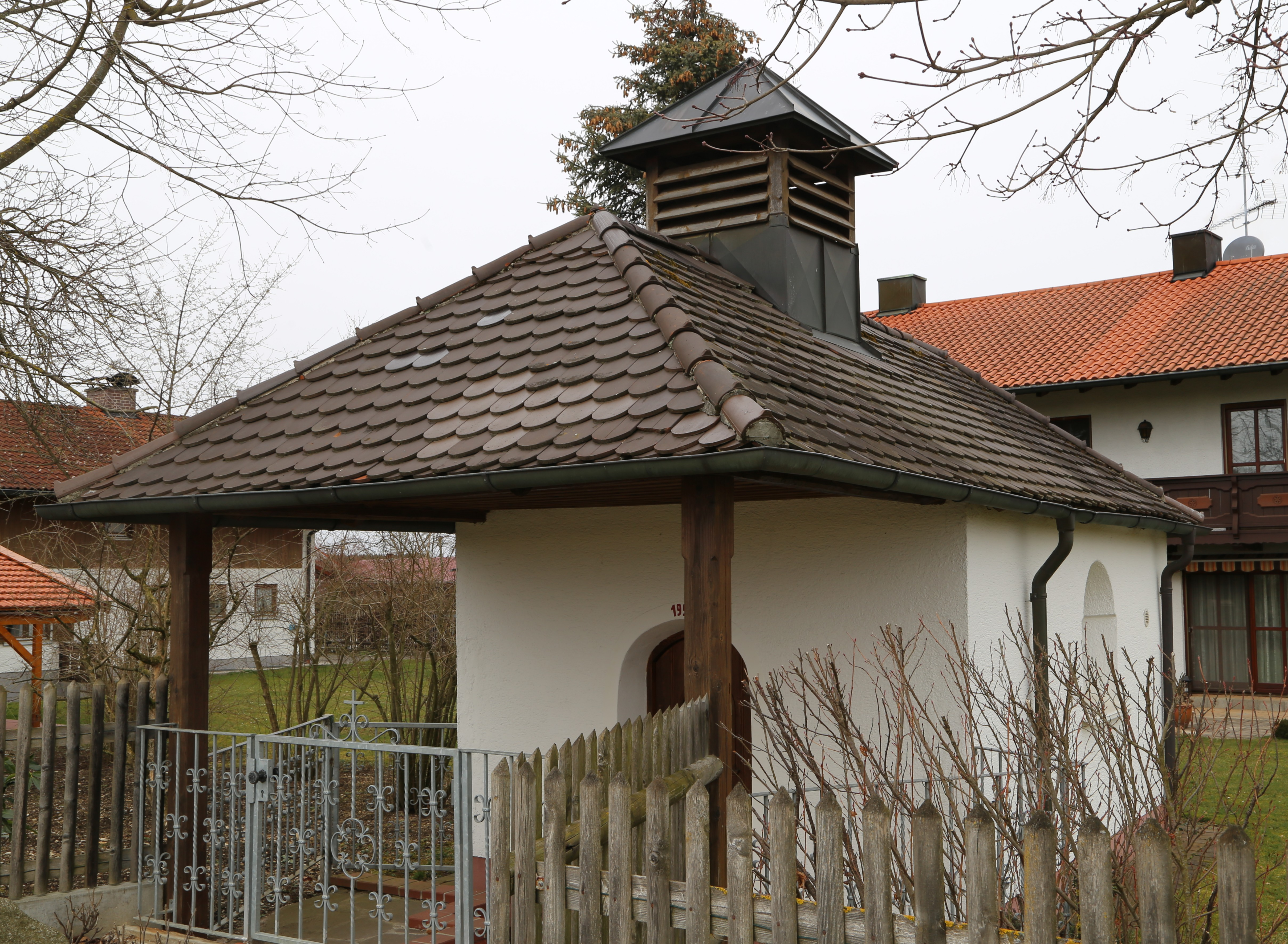 Kirchtruderinger Weg 4, Solalinden, Putzbrunn; Wegkapelle, kleiner Putzbau mit gerade schließendem Chor und weitem Vordach, wohl noch 18. Jahrhundert, mit Ausstattung